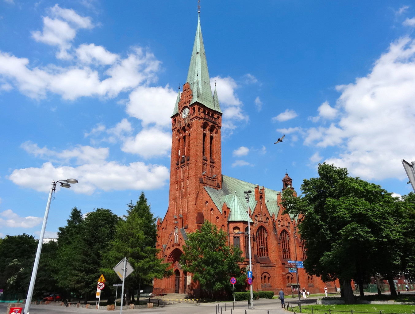 Kościół św. Andrzeja Boboli (Jezuicki) w Bydgoszczy, zbud. 1903 r., do 1945 r. fara ewangelicka